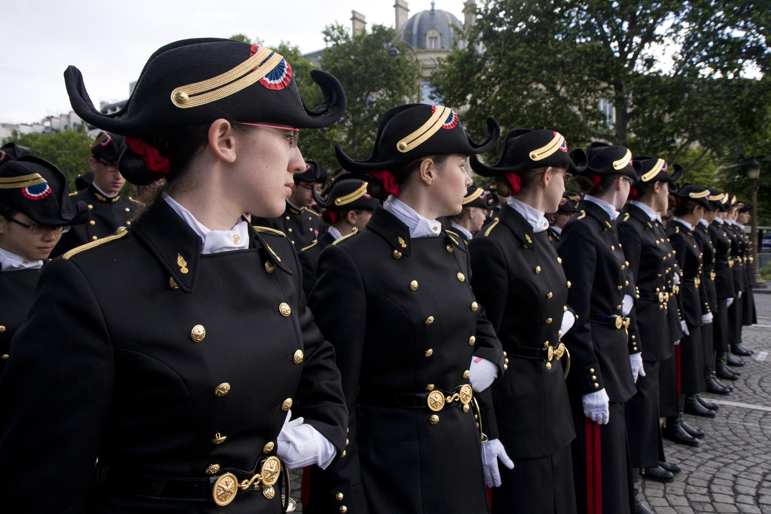 Photo du 14 juillet, élèves de l'École polytechnique